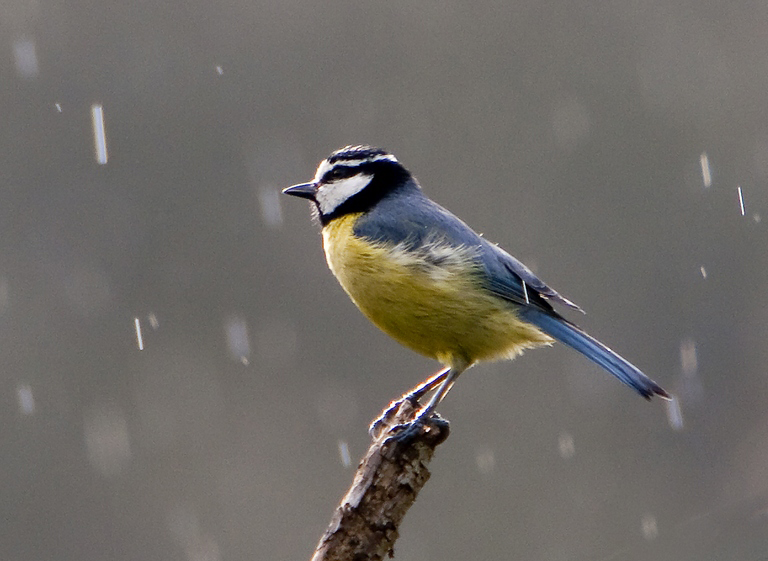 Cyanistes caeruleus teneriffae